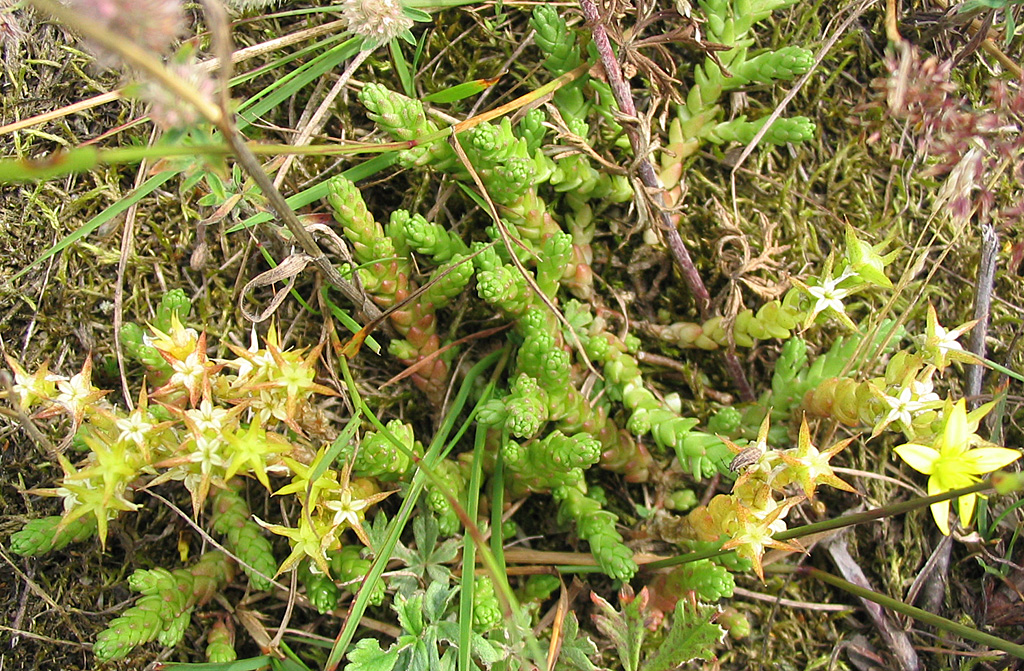 Mauerpfeffer (Sedum acre)